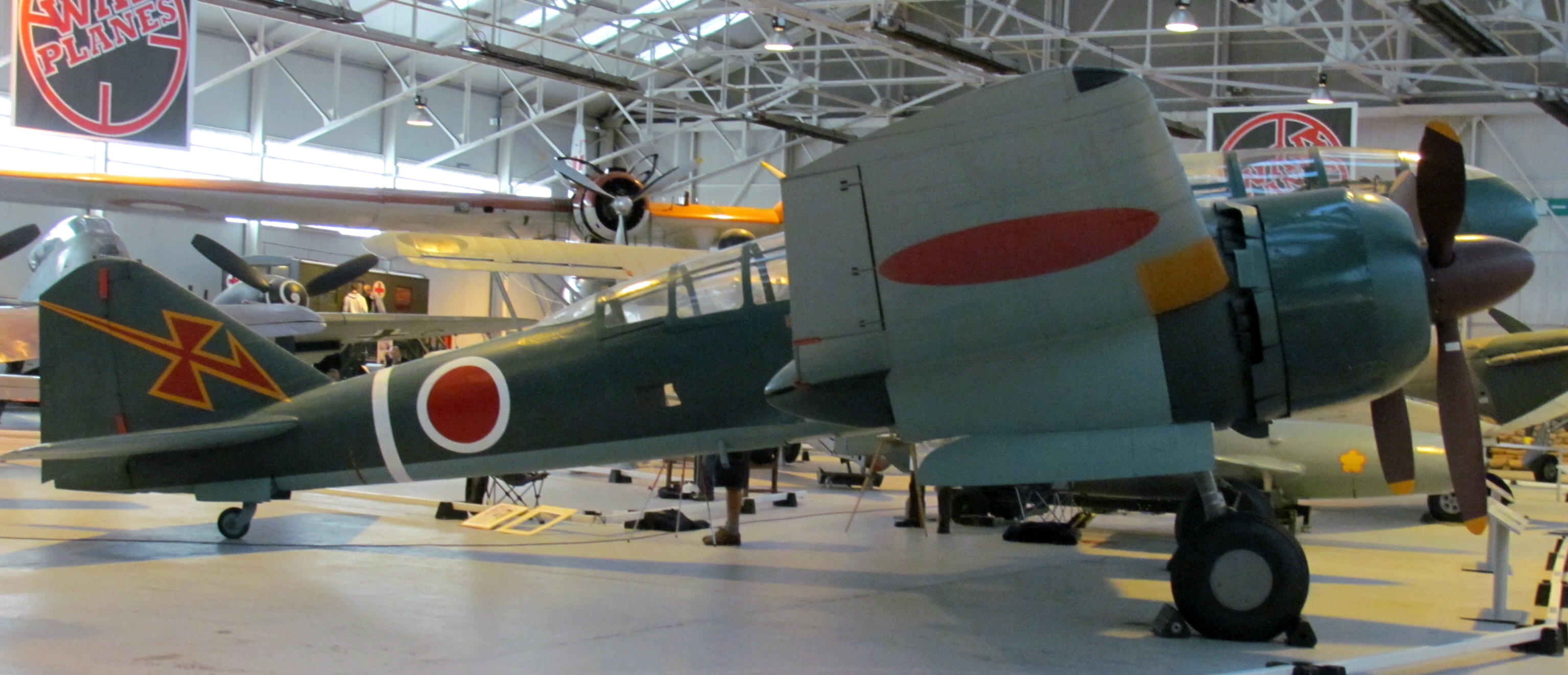 Mitsubishi K1-46